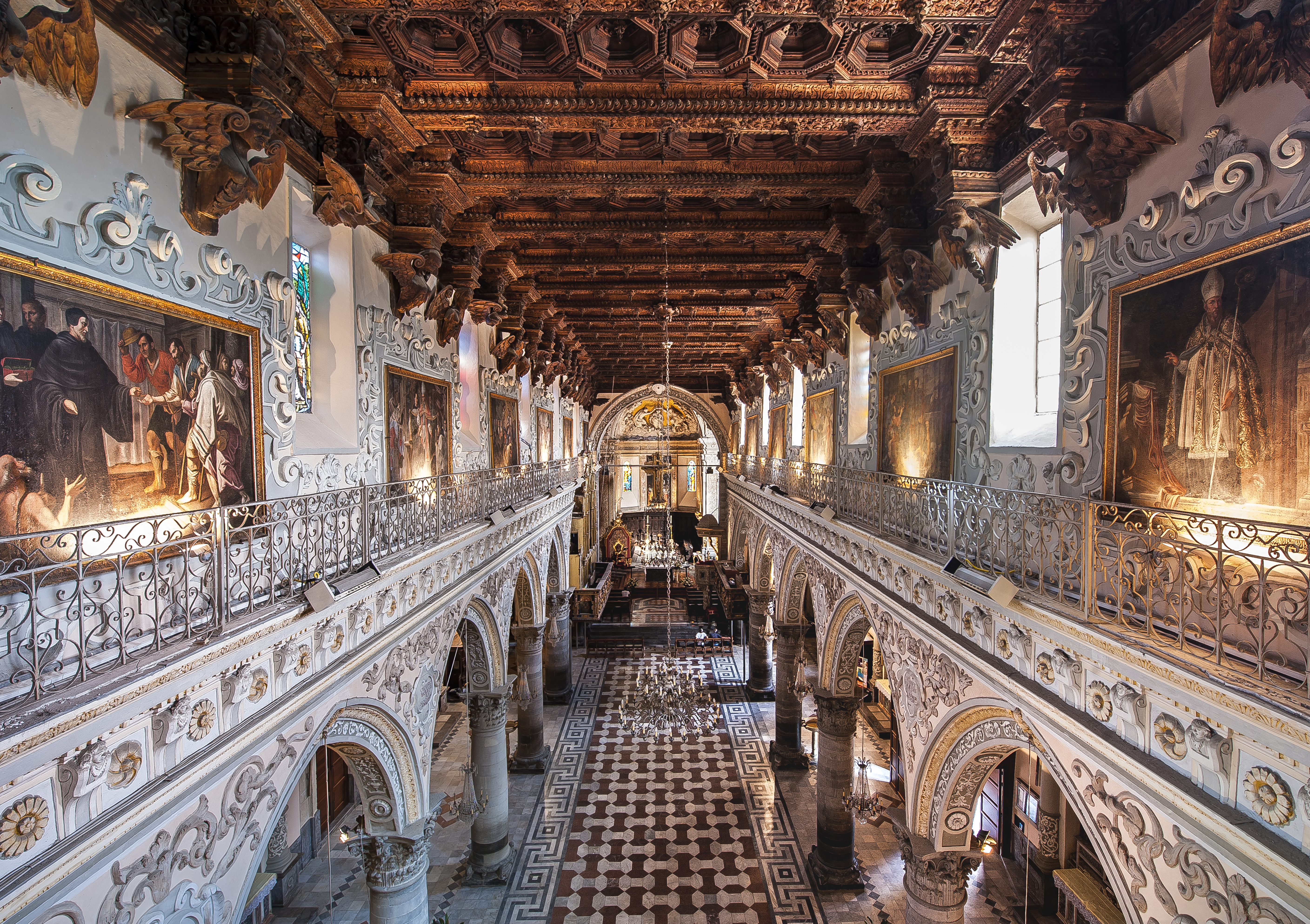 Interno del Duomo di Enna, scorcio soffitto ligneo